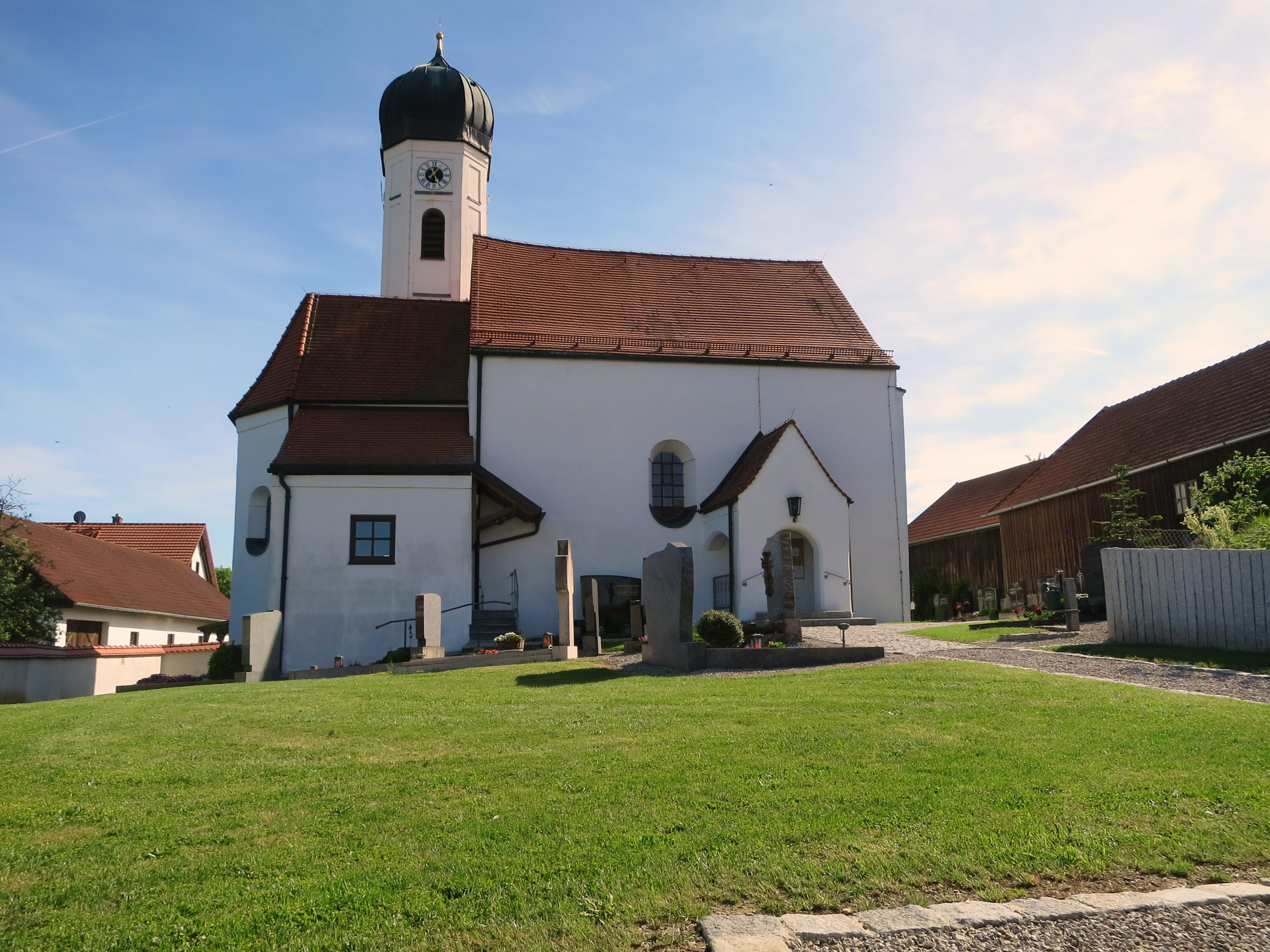 Katholische Filialkirche St. Stephan im OT Haimpertshofen der Stadt Pfaffenhofen an der Ilm, Landkreis PAF.